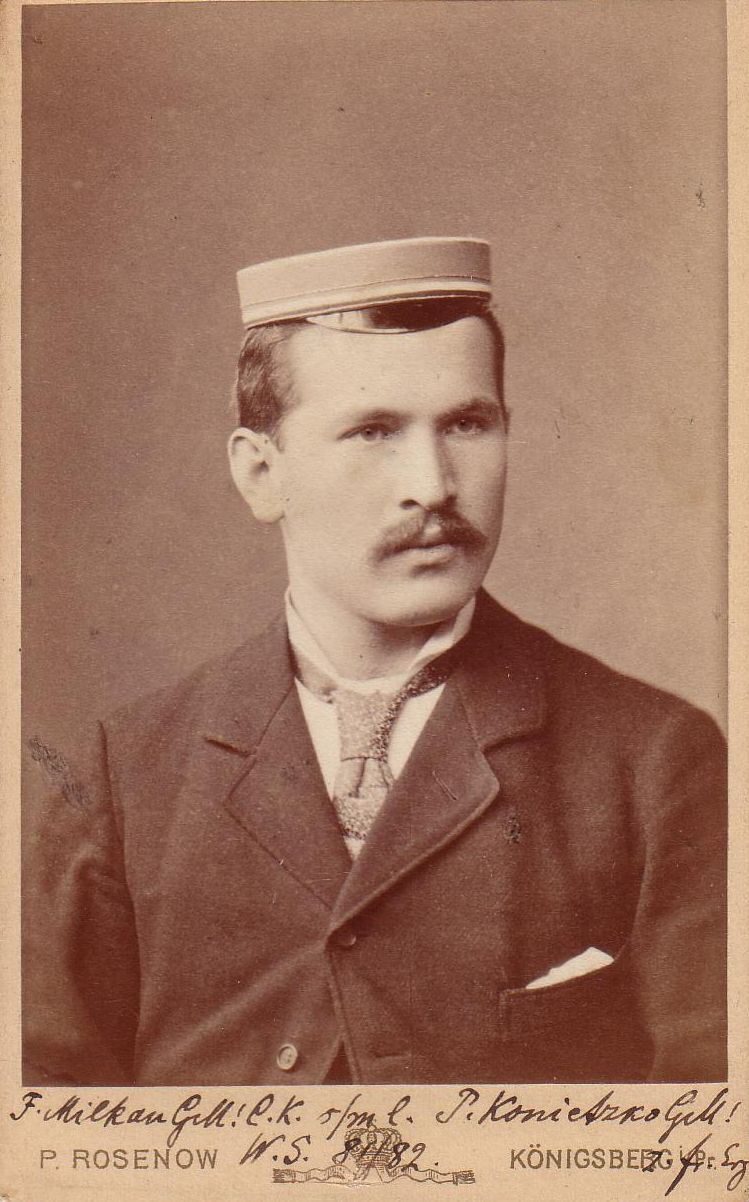 Porträtfotografie von Fritz Milkau als Student in Königsberg